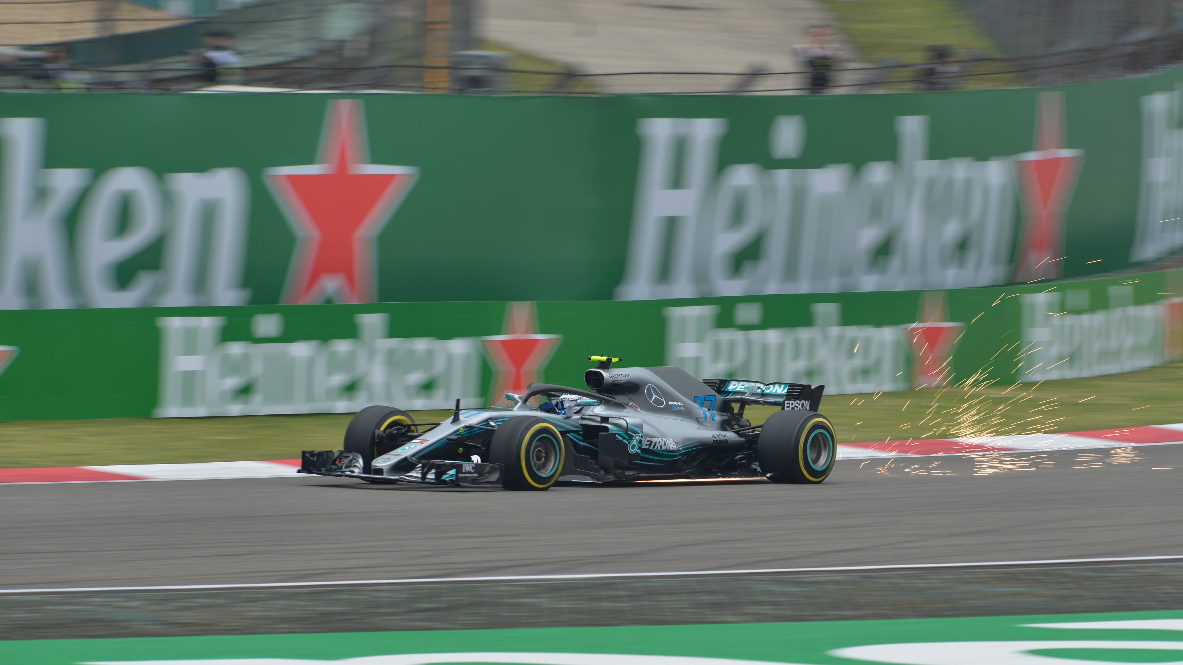 Mercedes